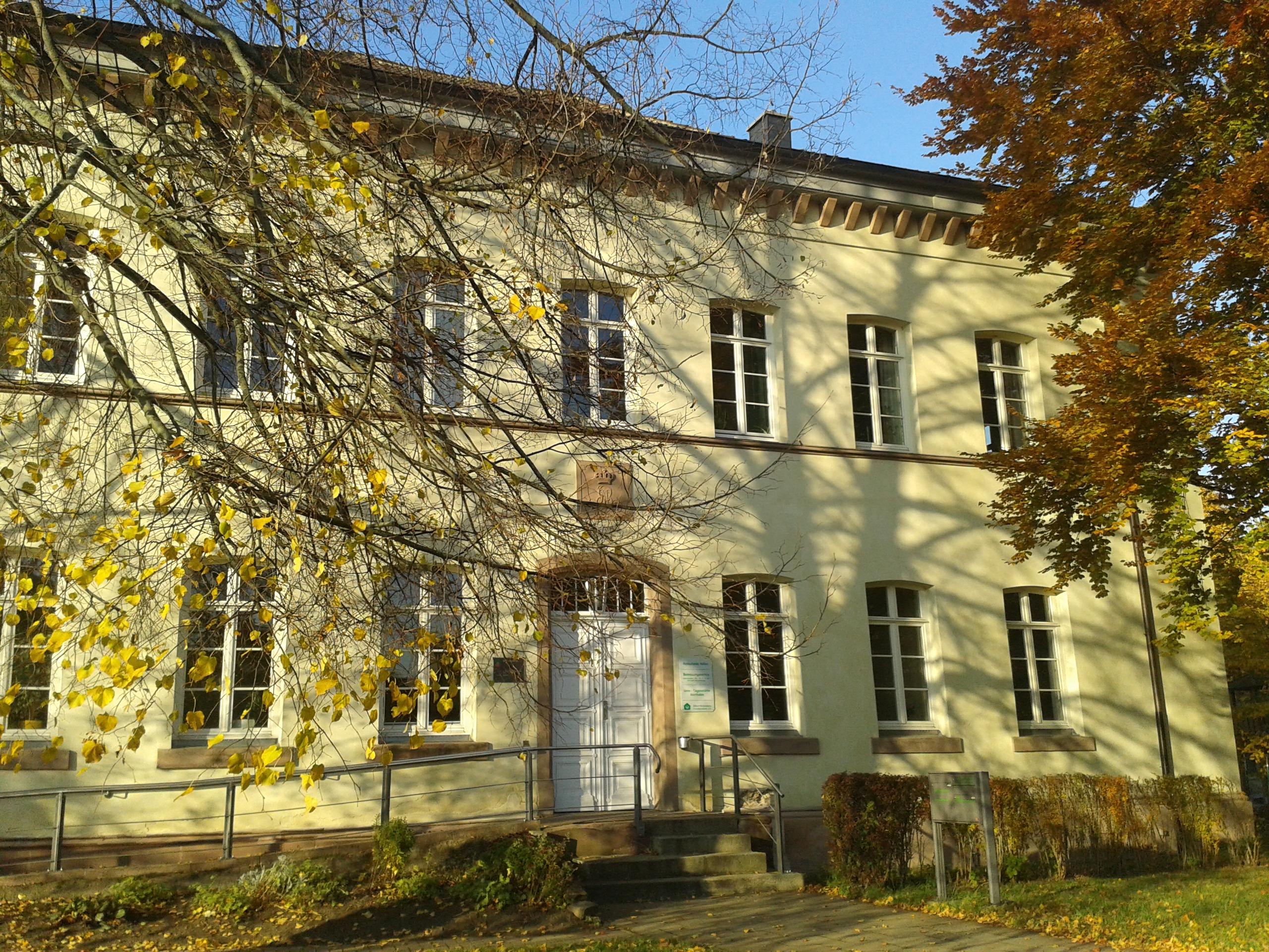 Ehemaliger Sitz des Amtsgerichts Northeim.